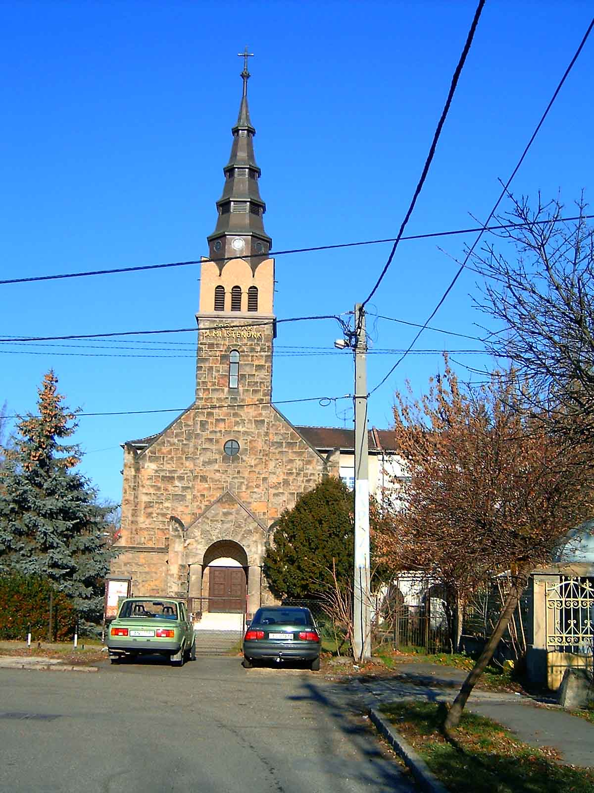 Budafoki Evangélikus Templom. Épült 1935-ben